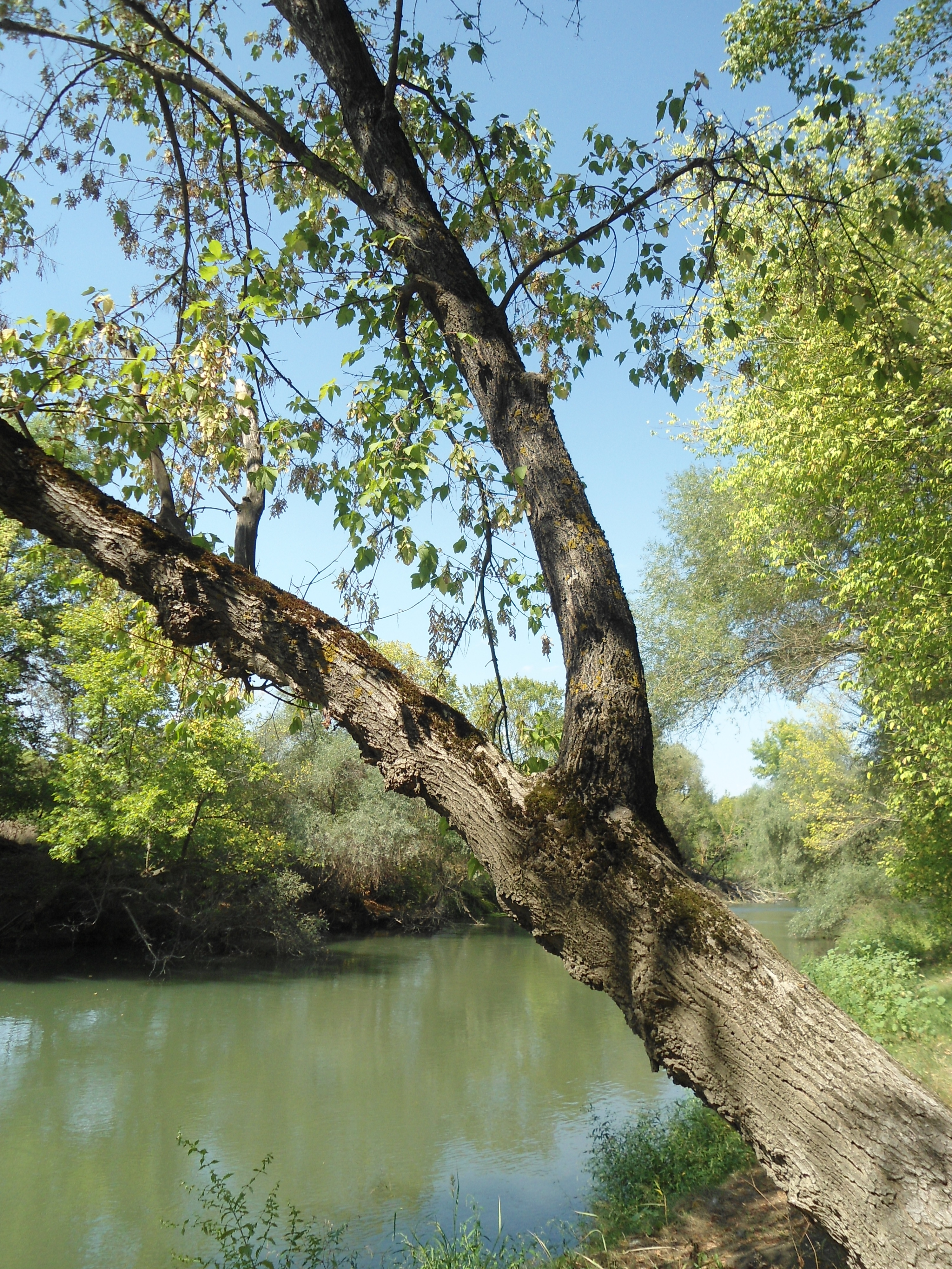 Ясенолистен явор, ствол.